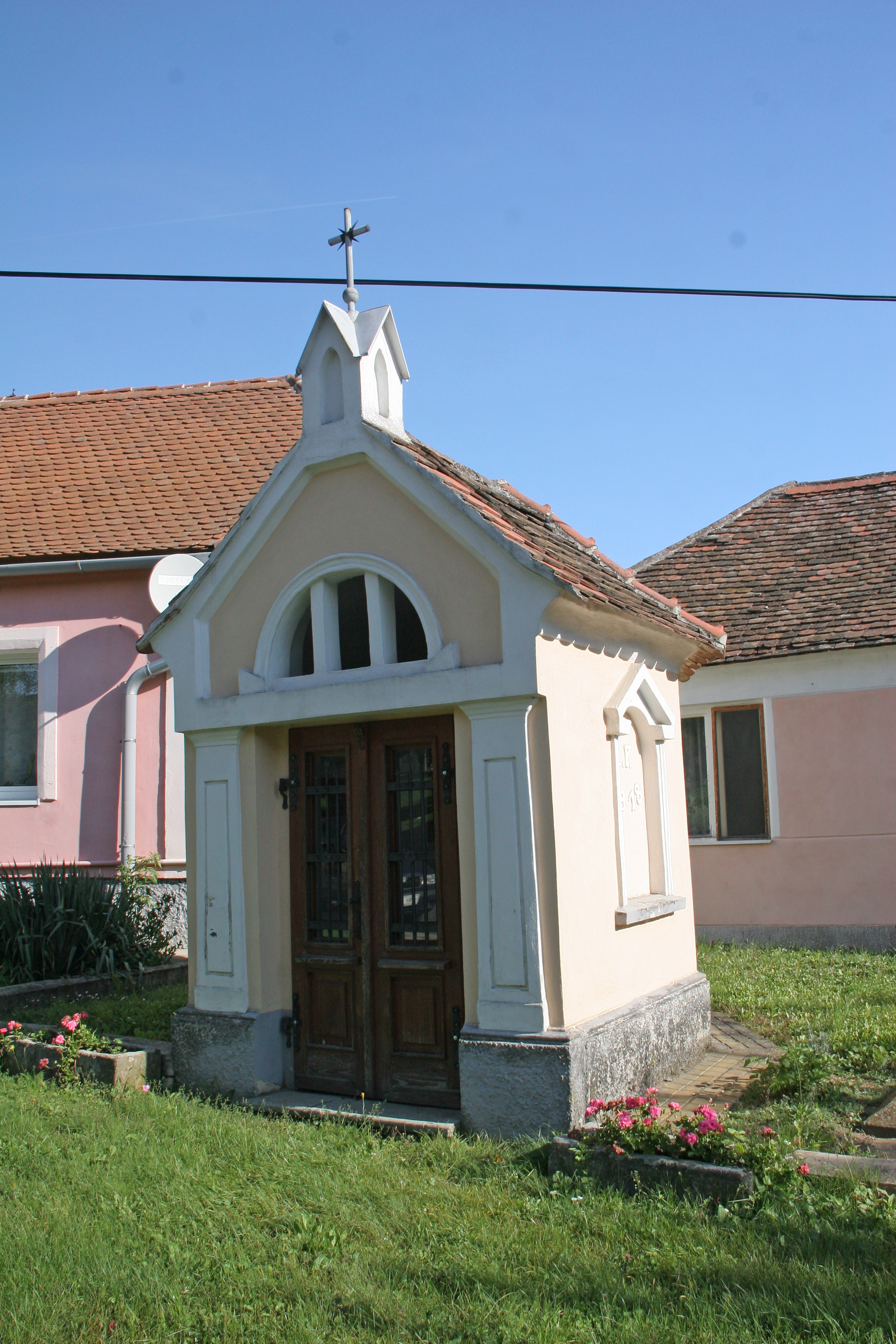 Kaplička, při kostele, Mašovice.